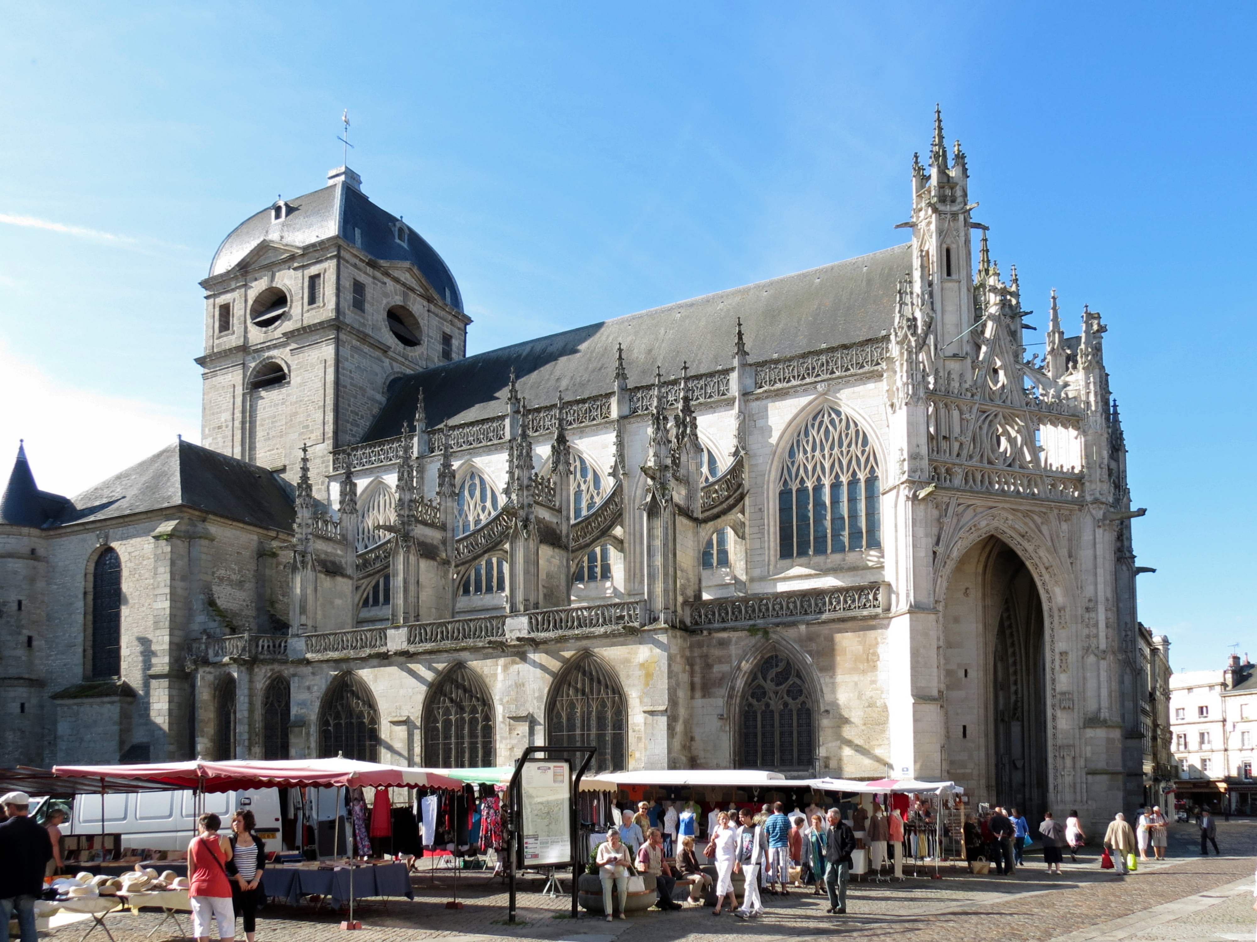 Basilique Notre-Dame, Alençon, Orne, Normandie.